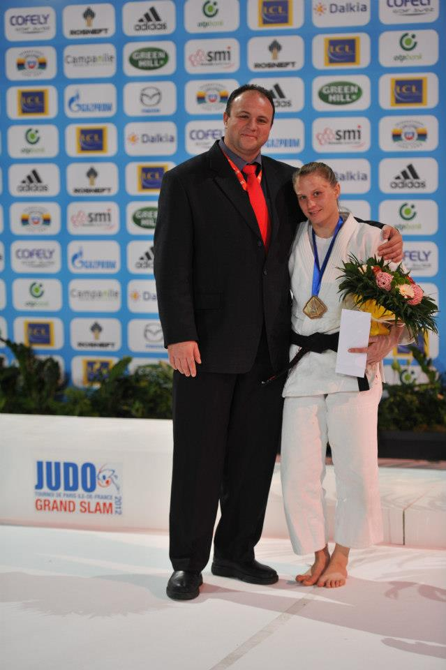 2012 Grand Slam Paris. С тренером Павлом Мусиным